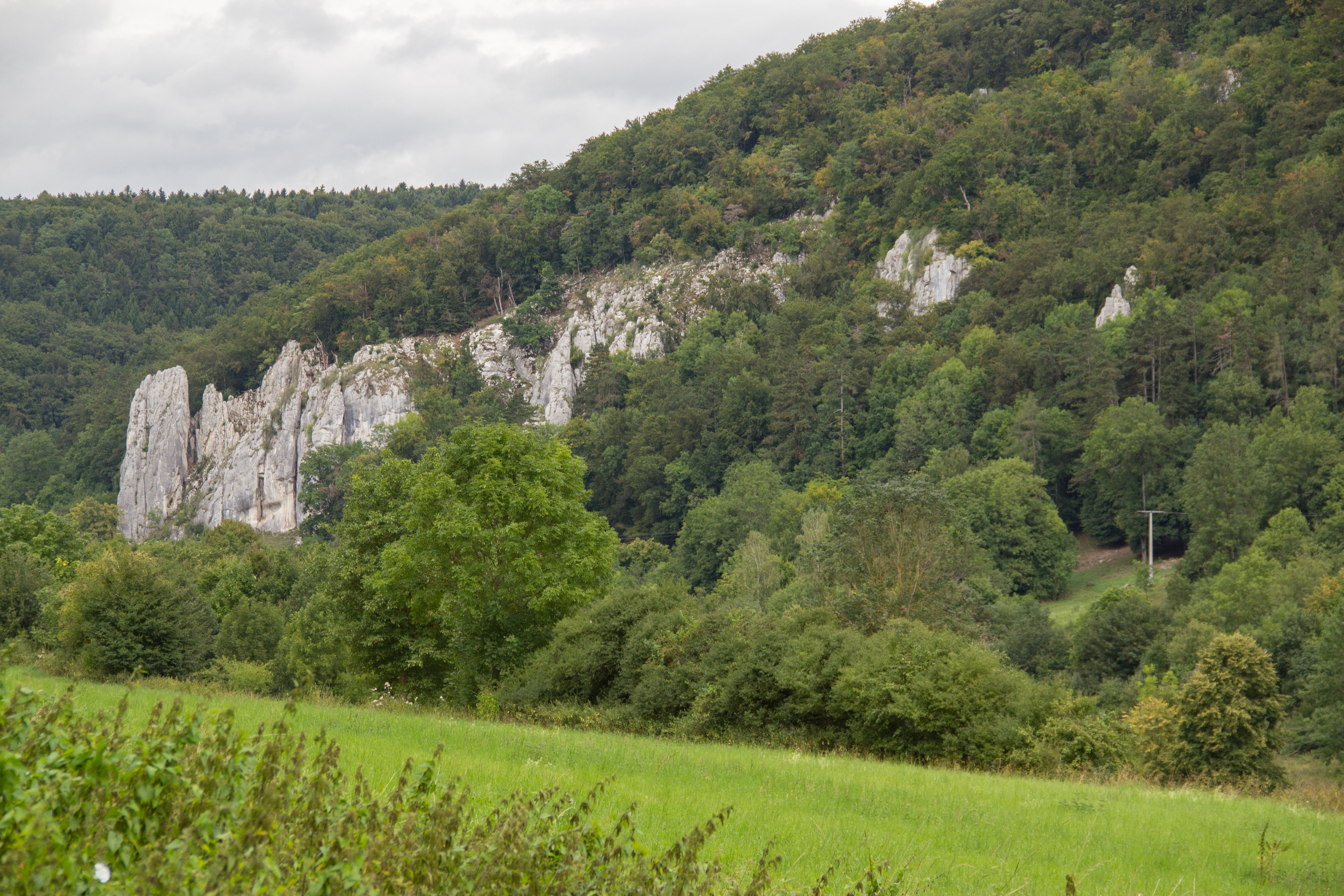 Naturschutzgebiet, Schloß Prunn, Landkreis Kehlheim